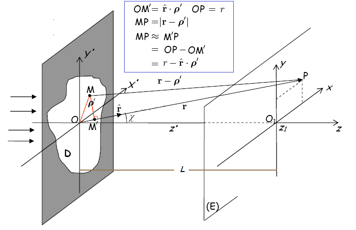 平行入射光在平面孔隙的衍射示意图